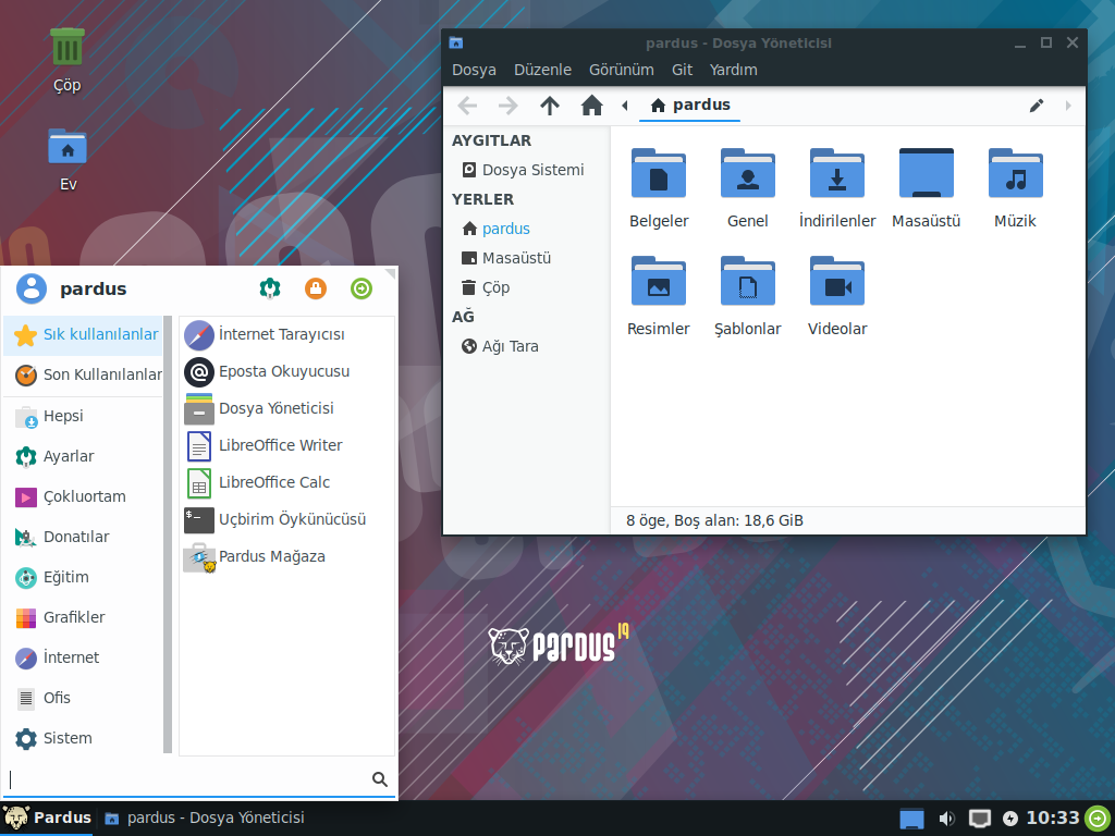 Pardus 19.1 sürümü